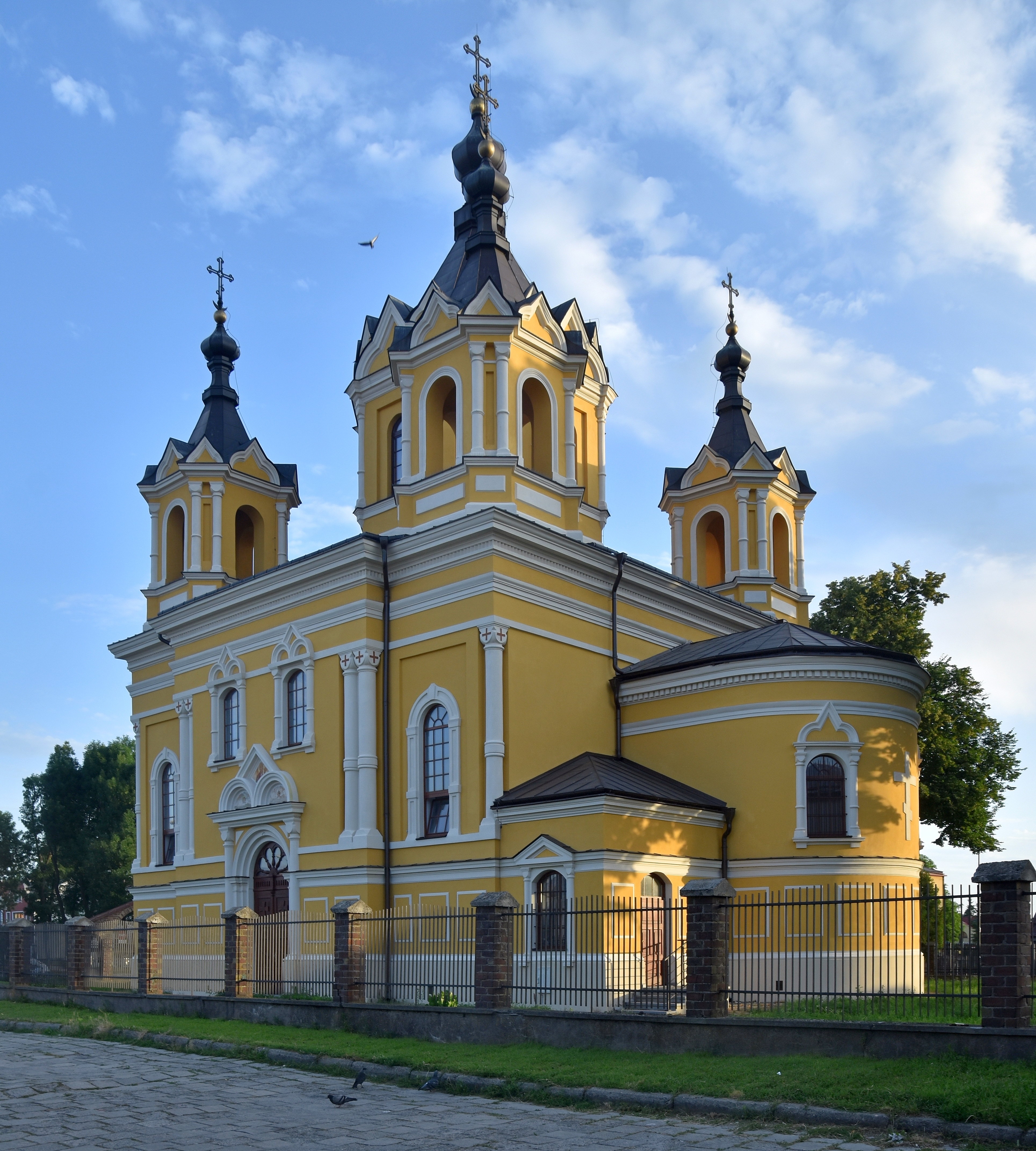 Tomaszów Lubelski, Cerkiew św. Mikołaja w Tomaszowie Lubelskim